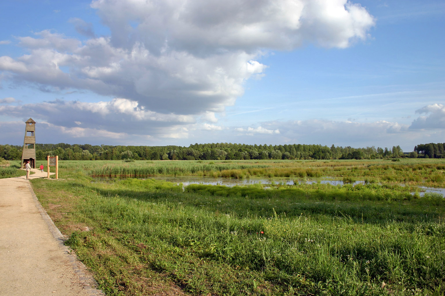 Zelf gemaakte foto van provinciedomein Het Vinne.